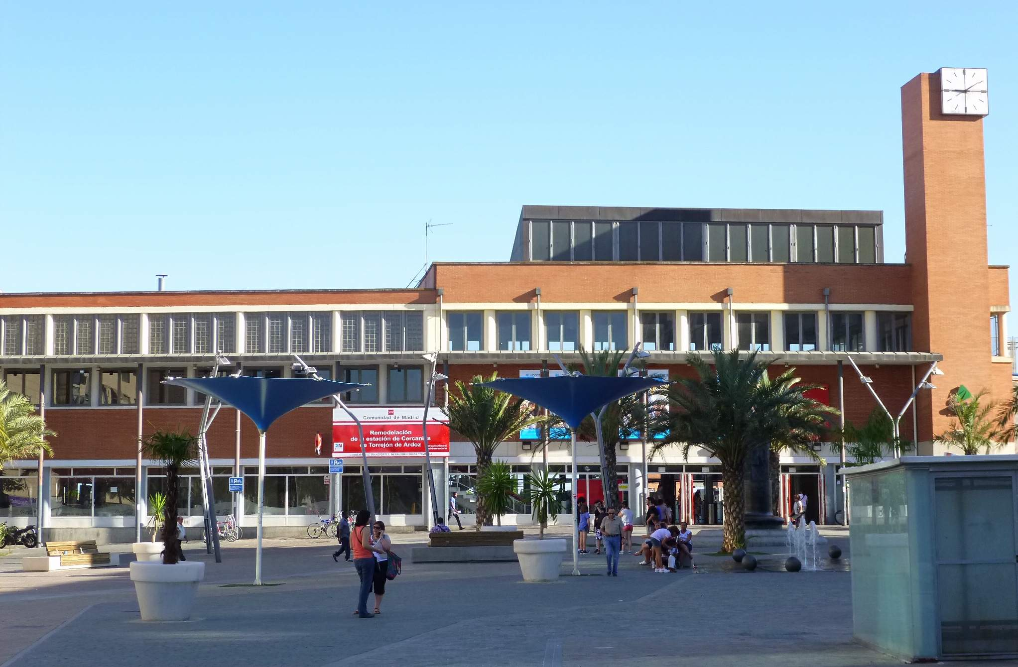 Estación de tren de Torrejón de Ardoz.